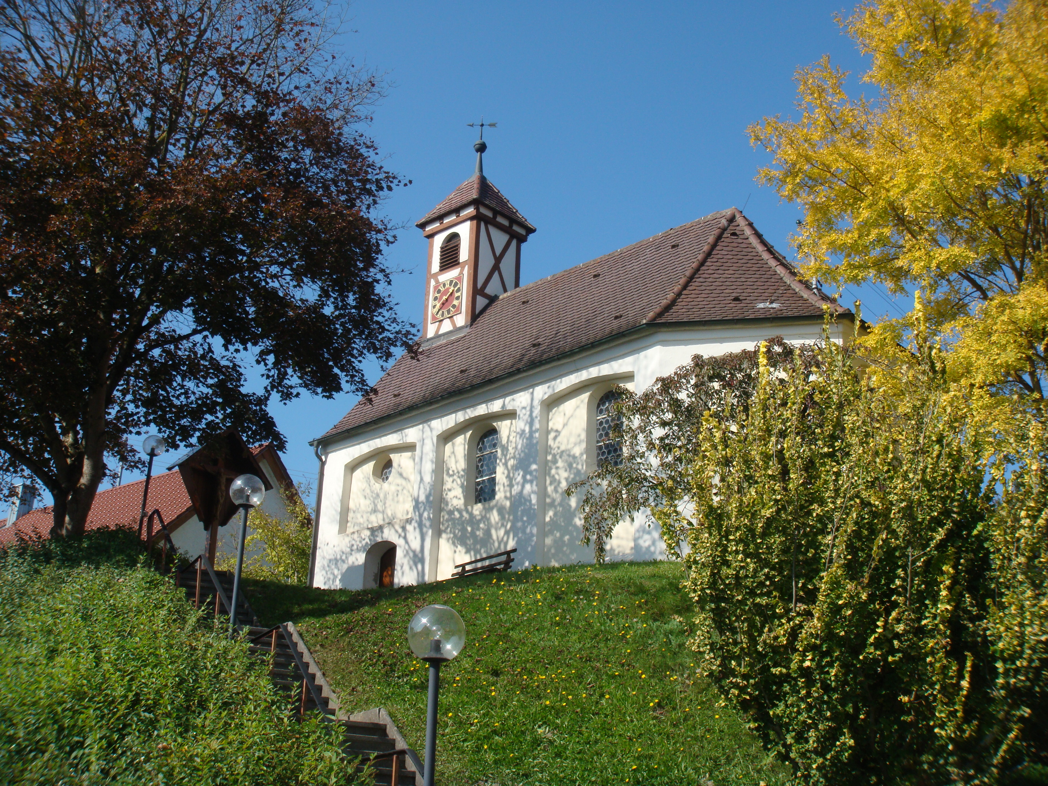 Weihungszell Dorfkapelle St. Peter und Paul